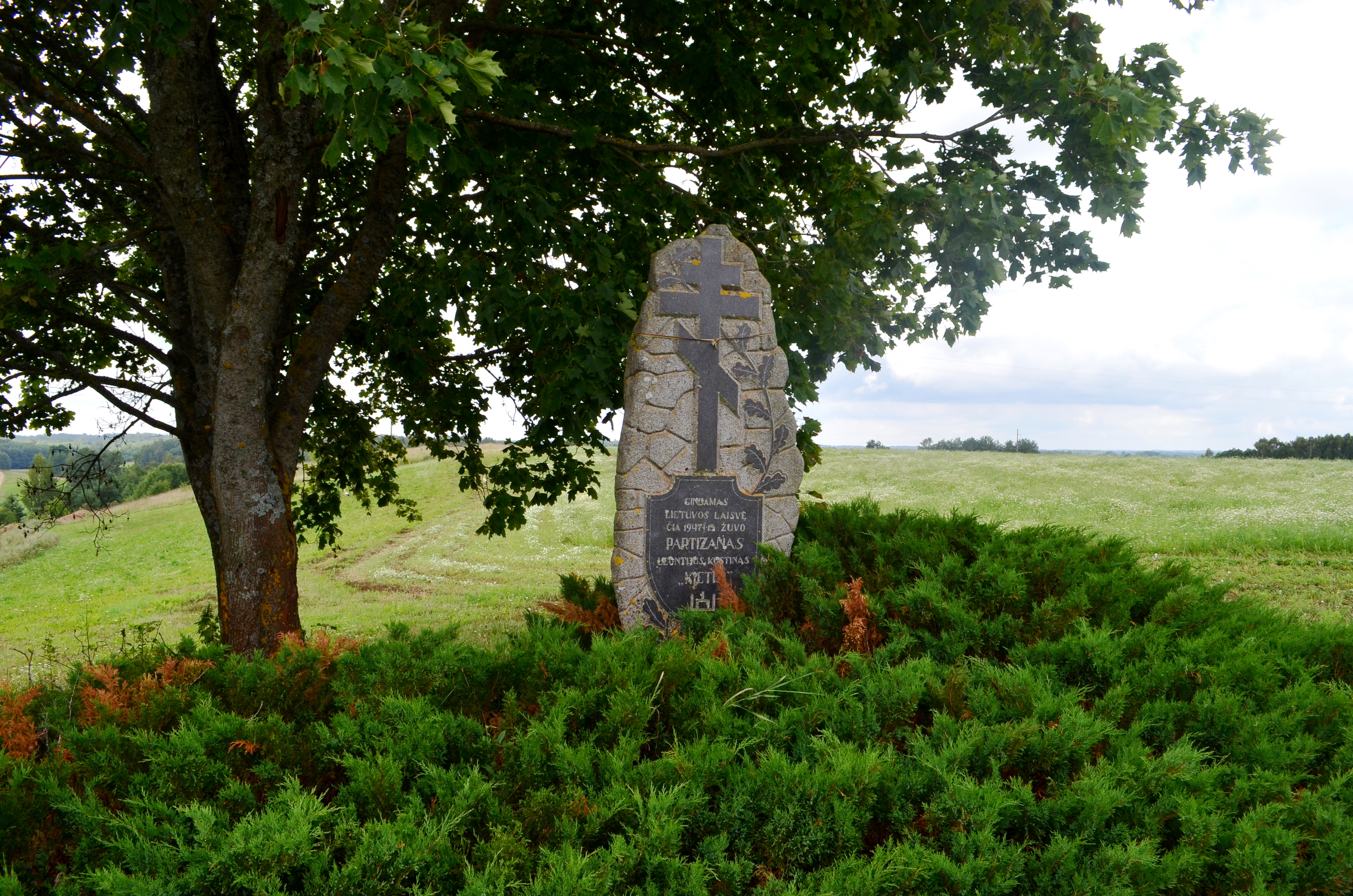 Paminklas partizanui "Kiečiui", Aliai, Utenos raj.